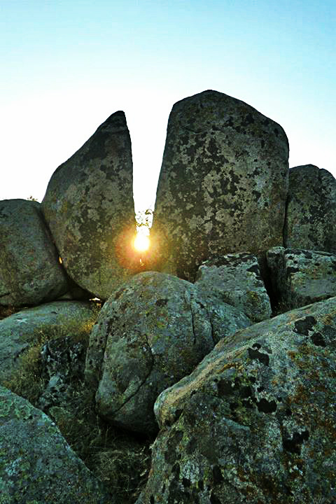 Изгревът над светилището на Св.Мина